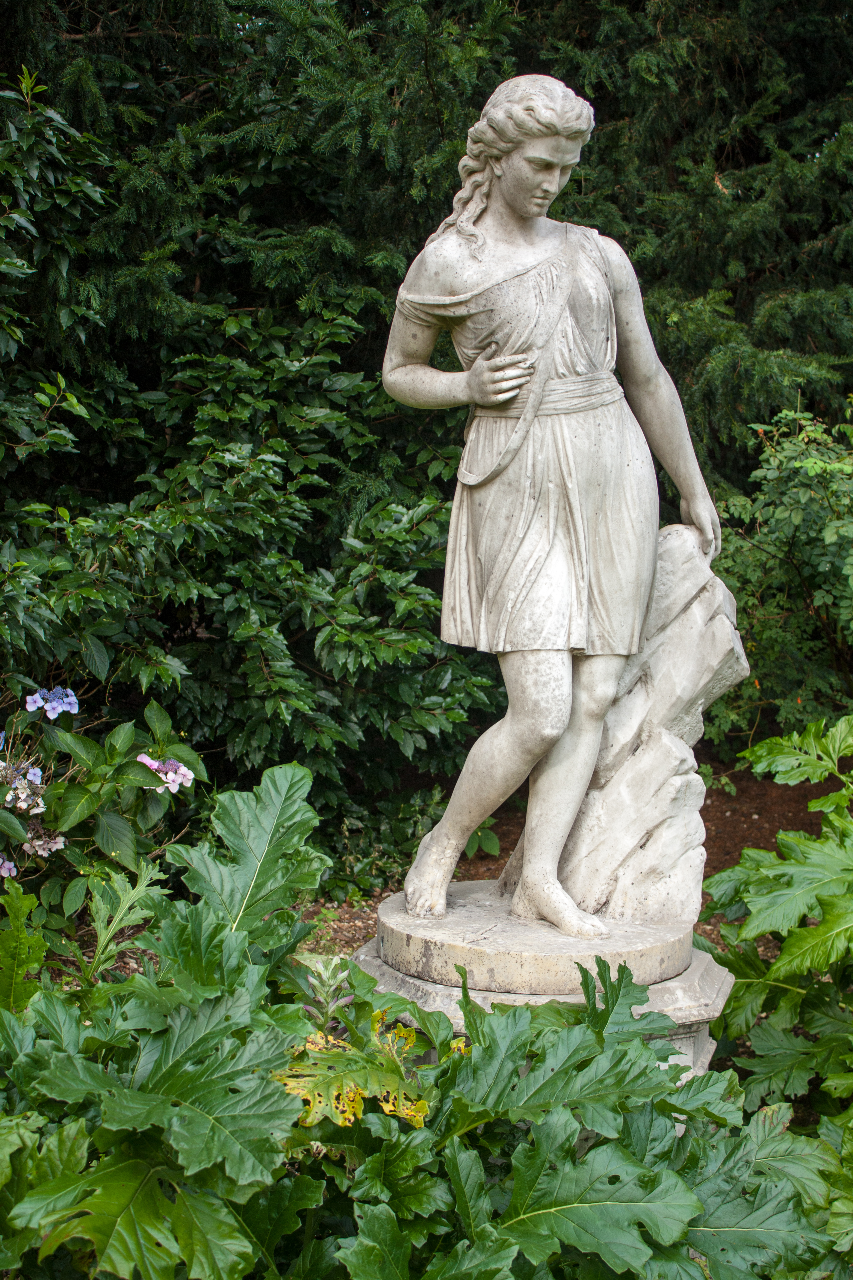 Secret Garden, Cliveden